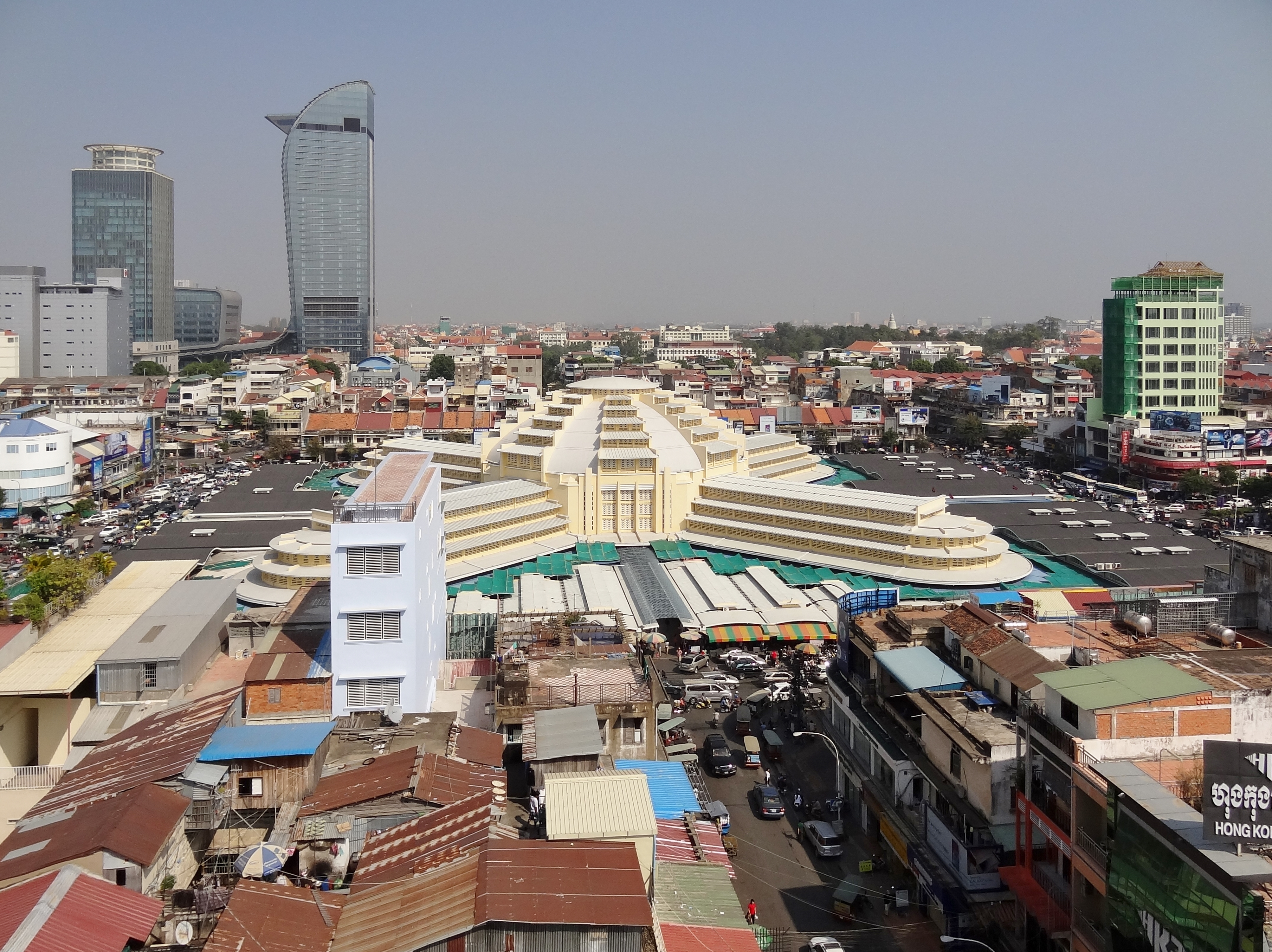 Blick auf den Zentralmarkt von Phnom Penh, Kambodscha